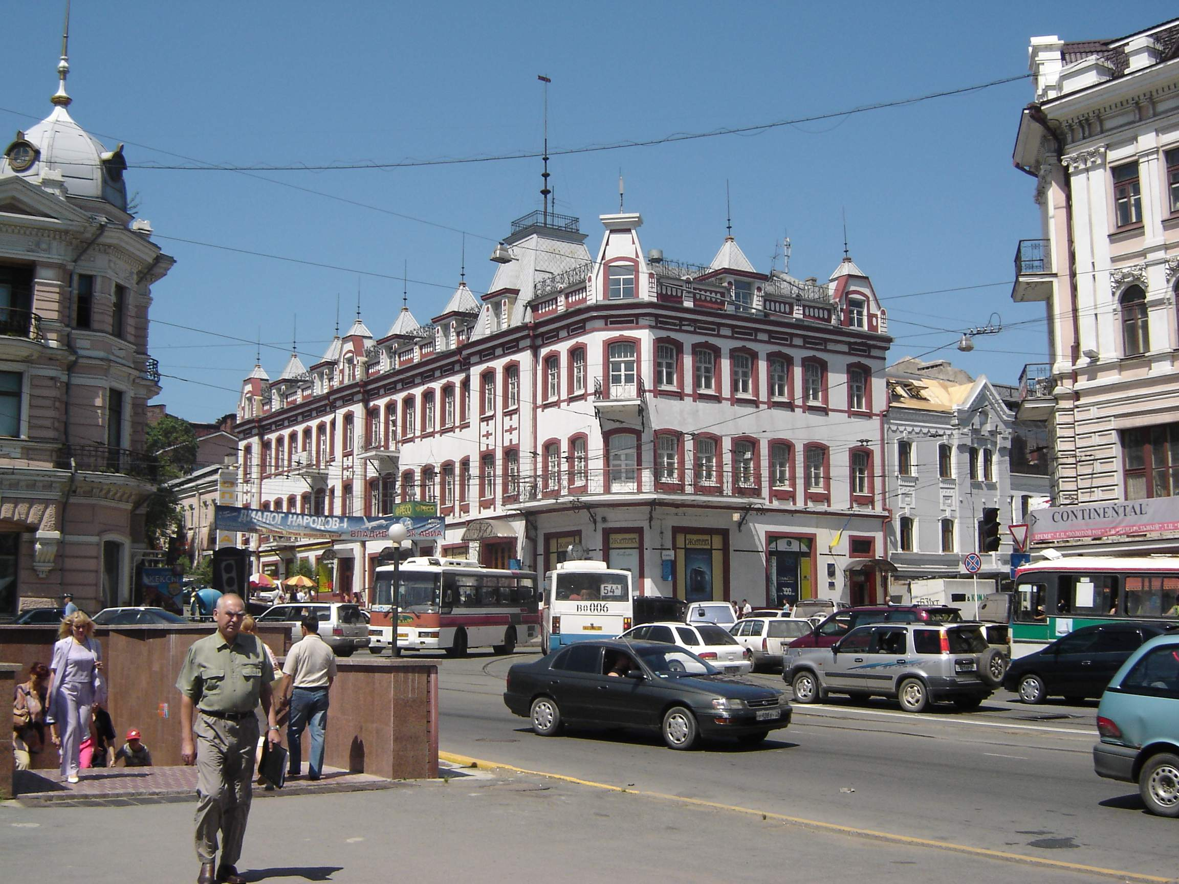 Владивосток, перекрёсток Светланской (на переднем плане) и Алеутской. В центре — дом на Светланской, 11. 2005-08-15